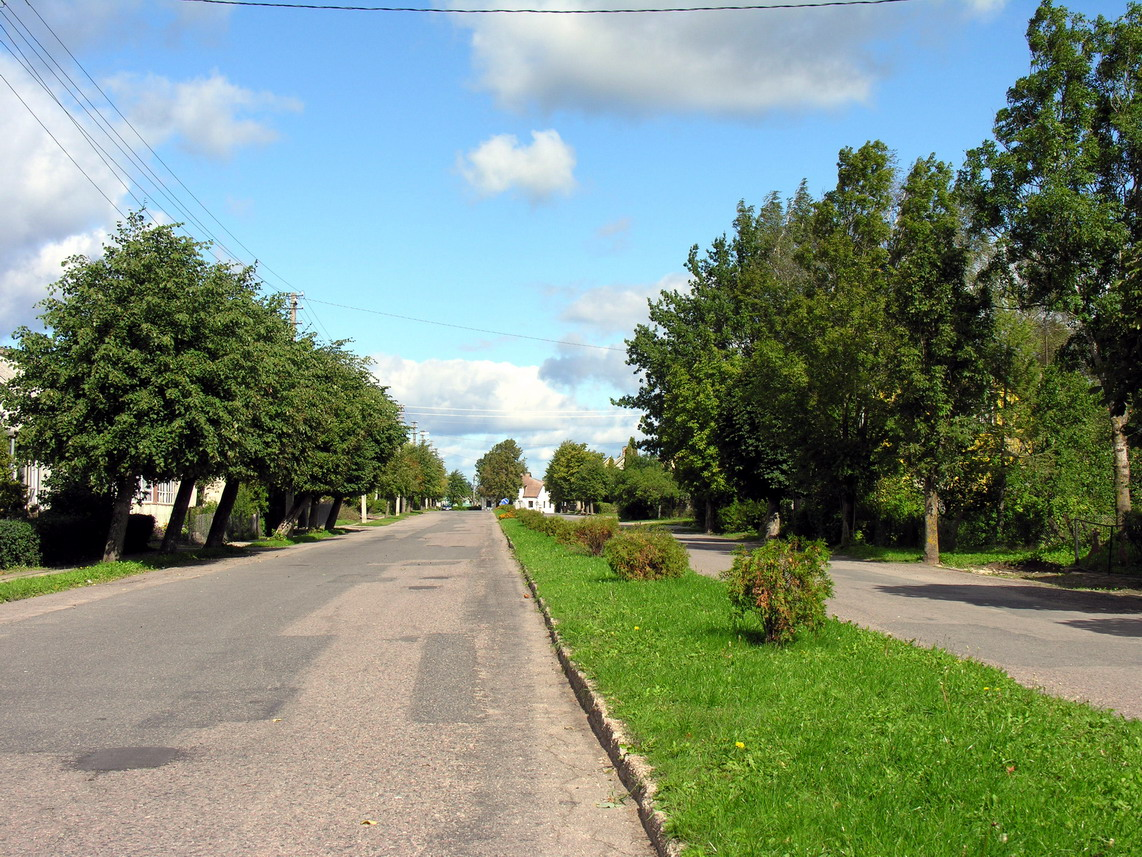 Židikų centrinė gatvė